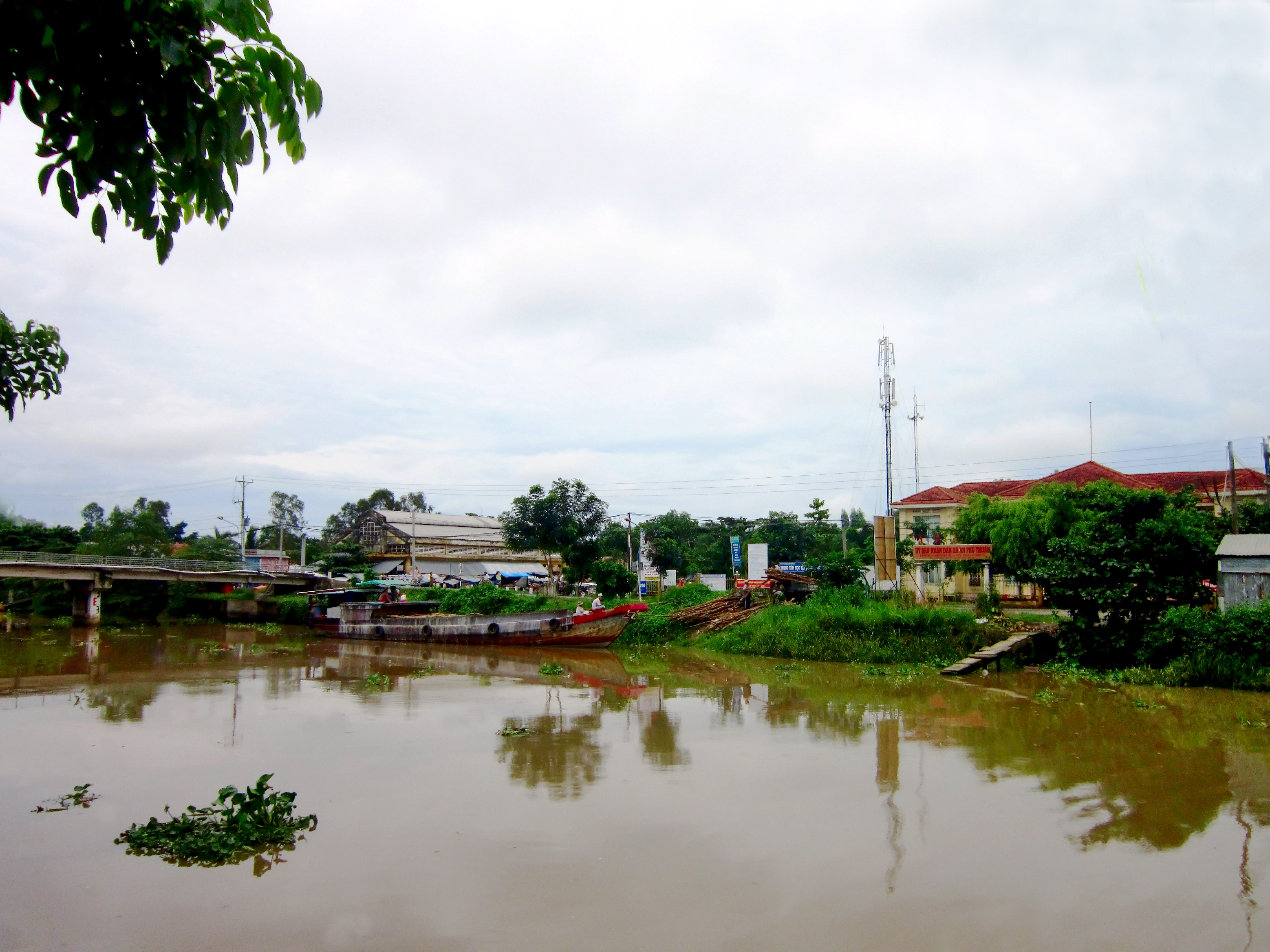 Ảnh: Khu vực chợ và Ủy ban xã An Phú Thuận, thuộc huyện Châu Thành, tỉnh Đồng Tháp, Việt Nam.